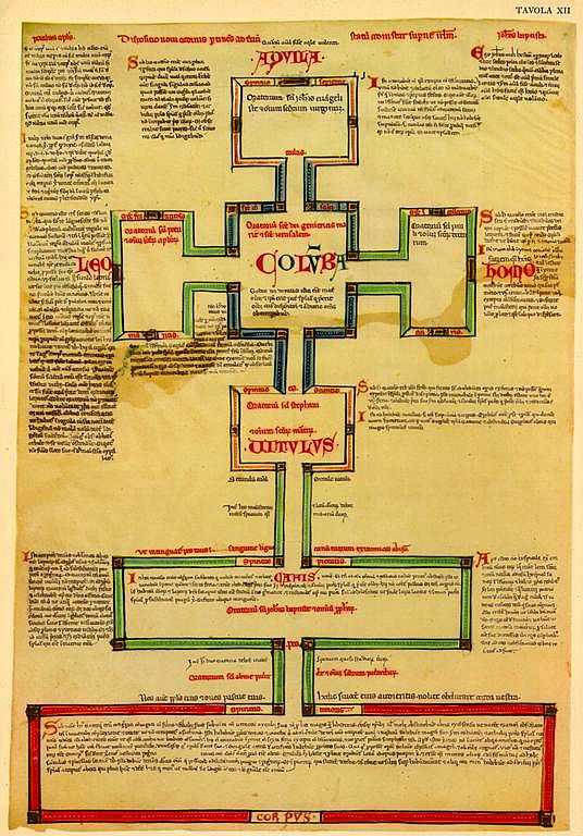 Tabla XII del manuscrito "Liber Figurarum", "Libro de las Figuras" del Abad Joaquin de Fiore (1135-1202) con la "Disposición simbólica del Nuevo Orden -Monástico- en la Tercera Edad", "La Era del Espíritu Santo".